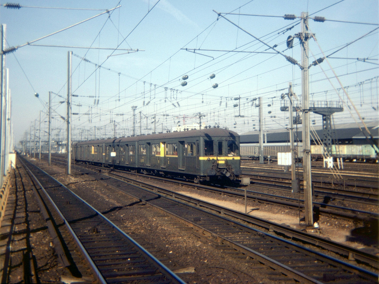 Une rame "Standard" à Pont-Cardinet le 18 septembre 1976.